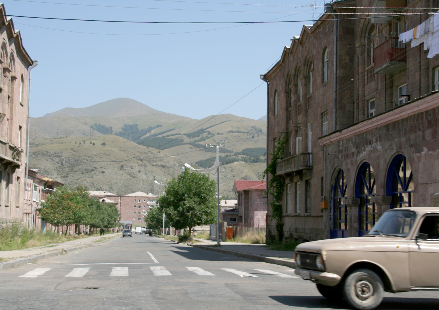 Rue de Vanadzor